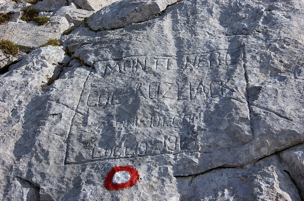 Ricordi di guerra.